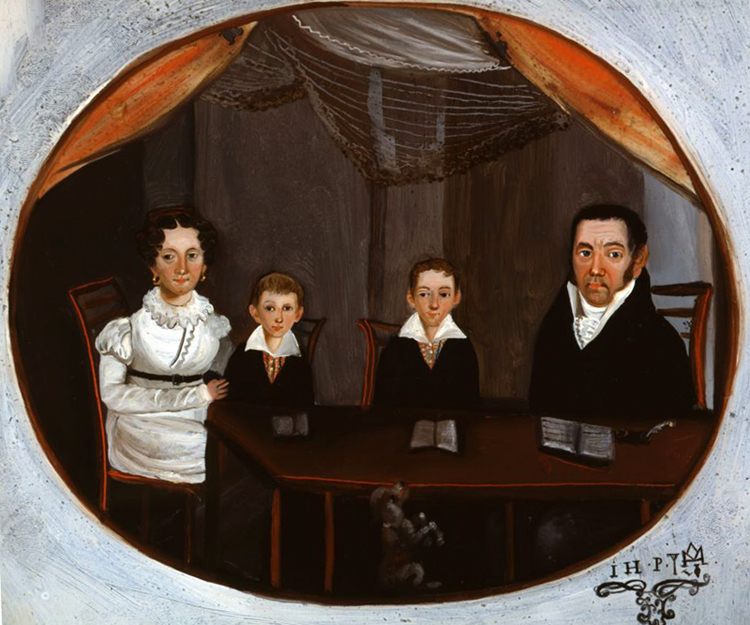 Apothekerfamilie Mayer aus Heilbronn ca. 1820/25, dargestellt sind die Eltern und zwei der drei Söhne: vermutlich Carl Gustav und Julius Robert. Hinterglasgemälde. Original im Haus der Stadtgeschichte in Heilbronn. Vgl. [1]